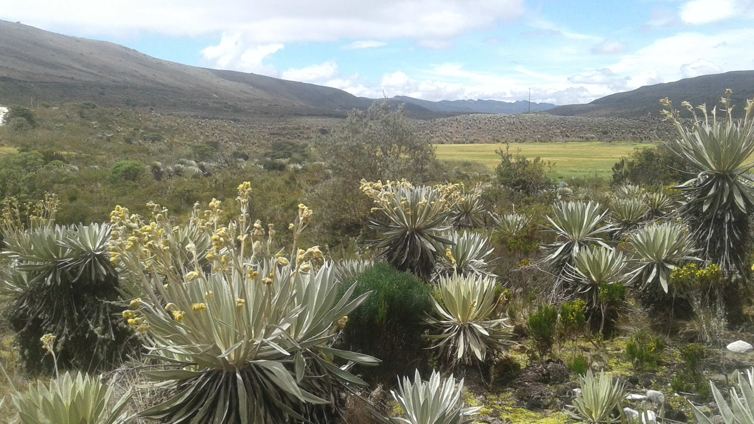 Esta fotografía fue tomada en un área protegida de Colombia con el [ Esta fotografía fue tomada en un área protegida de Colombia con el código 114 del RUNAP. código Esta fotografía fue tomada en un área protegida de Colombia con el código 114 del RUNAP. del RUNAP].